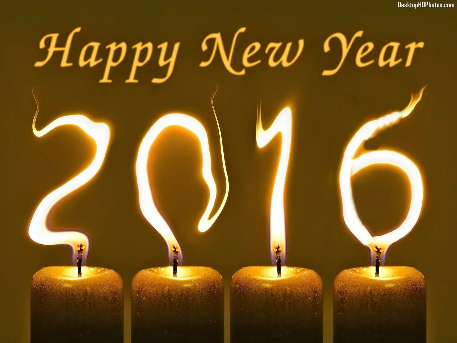 இணைப்புச் சொல் பக்கத் தலைப்பு